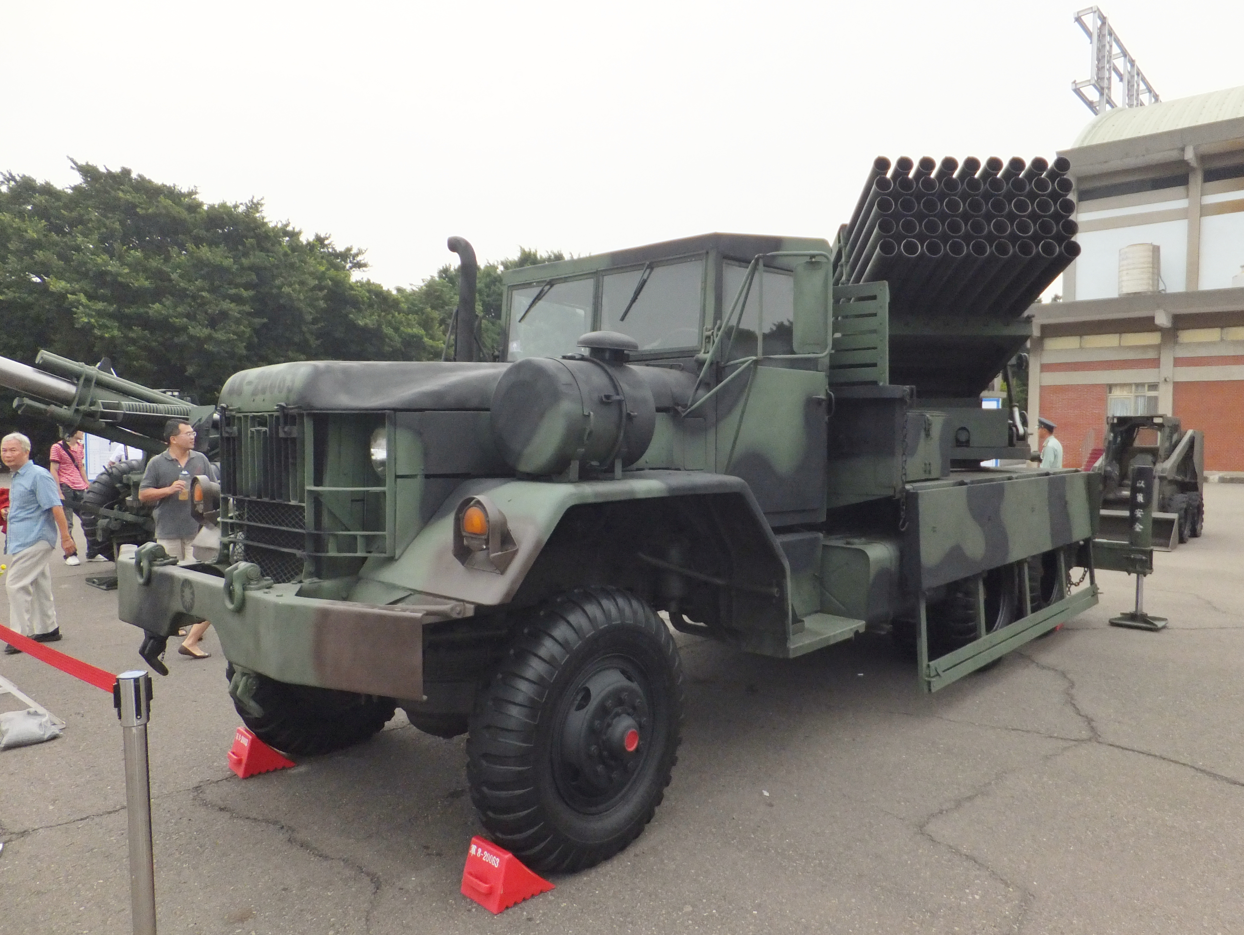 左前方所見工蜂六型多管火箭系統，成功嶺營區開放活動中攝影。